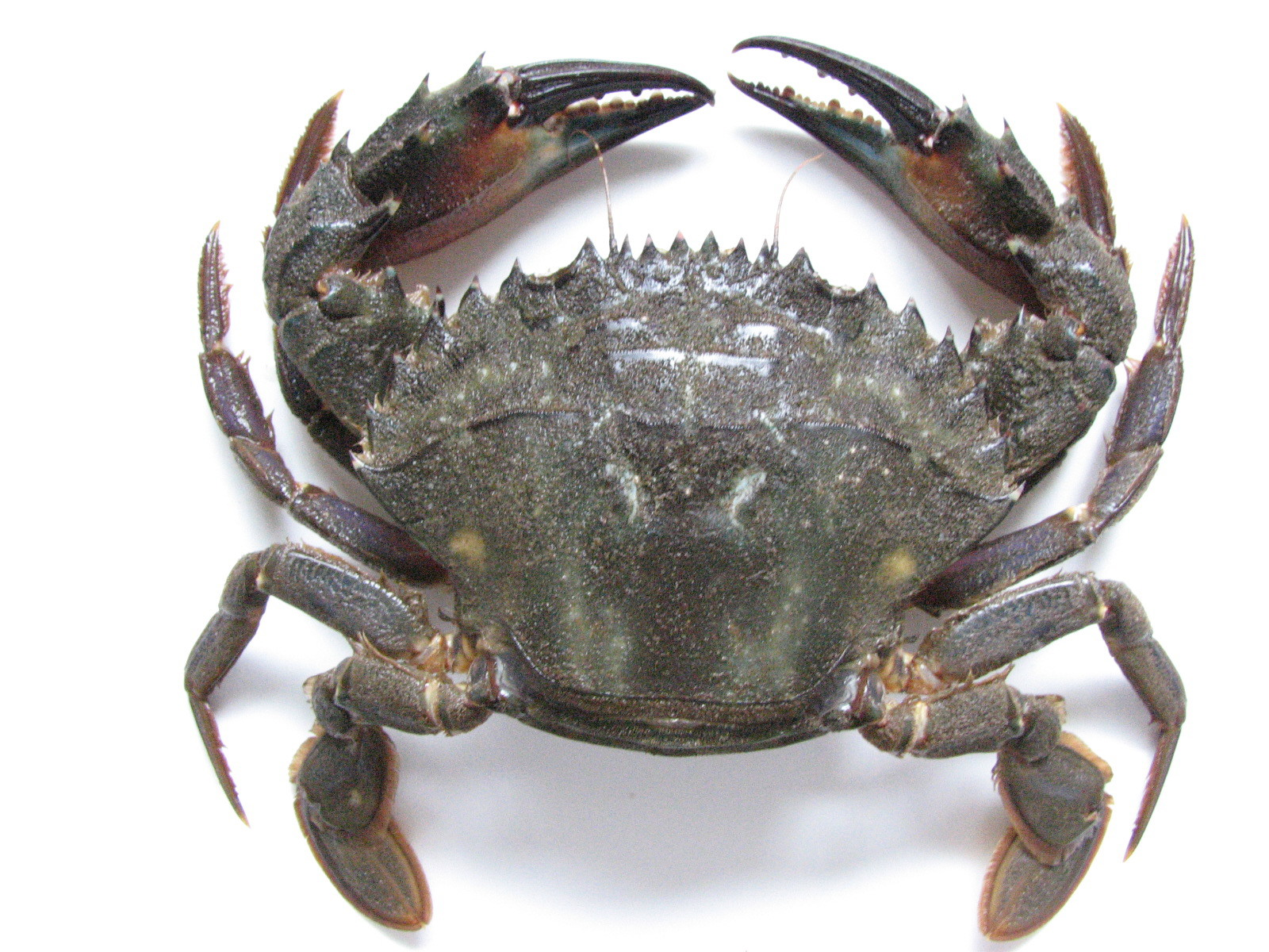 イシガニ(鹿島港・雌個体；Charybdis japonica female)